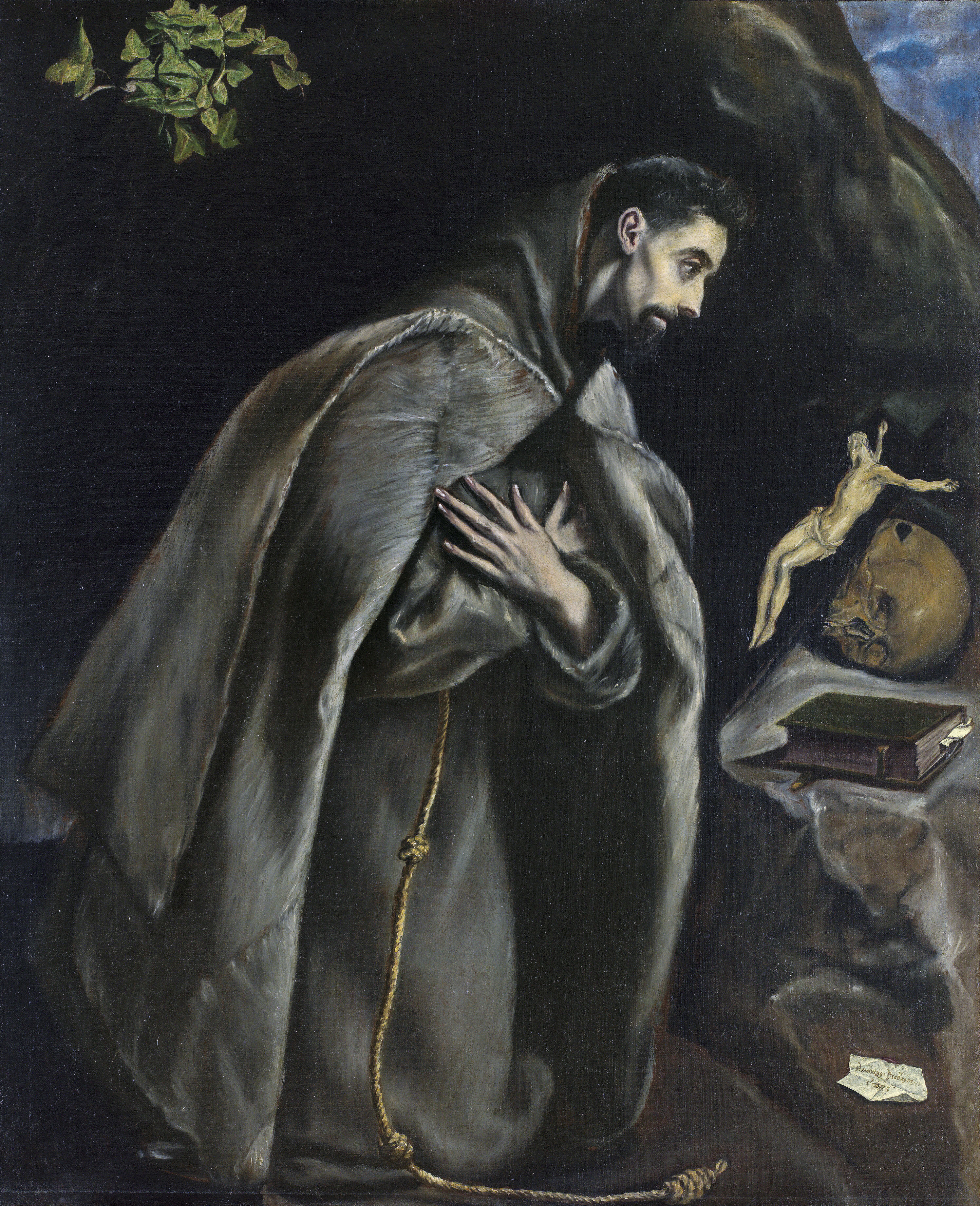 El lienzo muestra a San Francisco de Asís rezando arrodillado ante una imagen de Cristo crucificado.